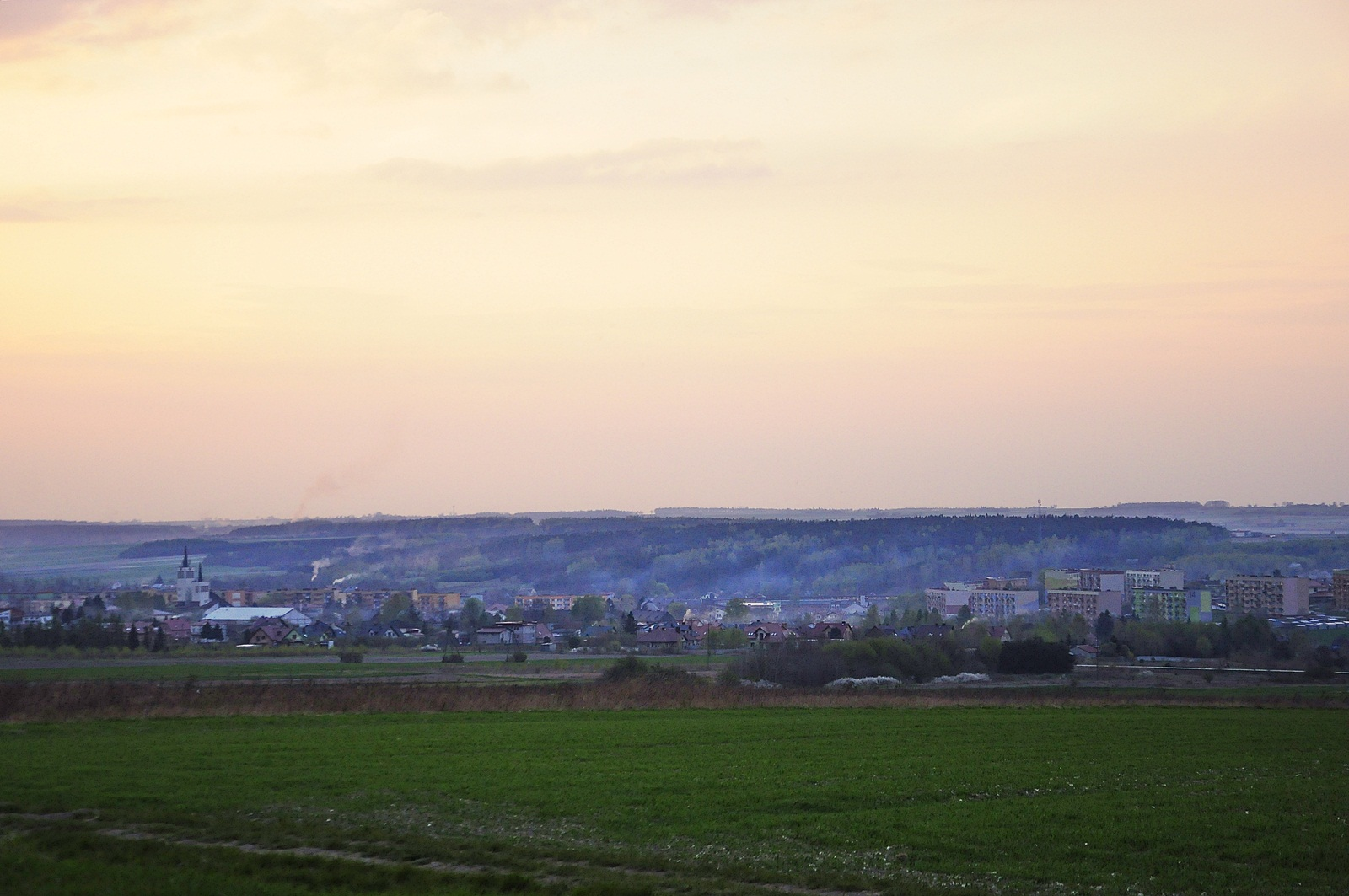 Widok od strony południowej